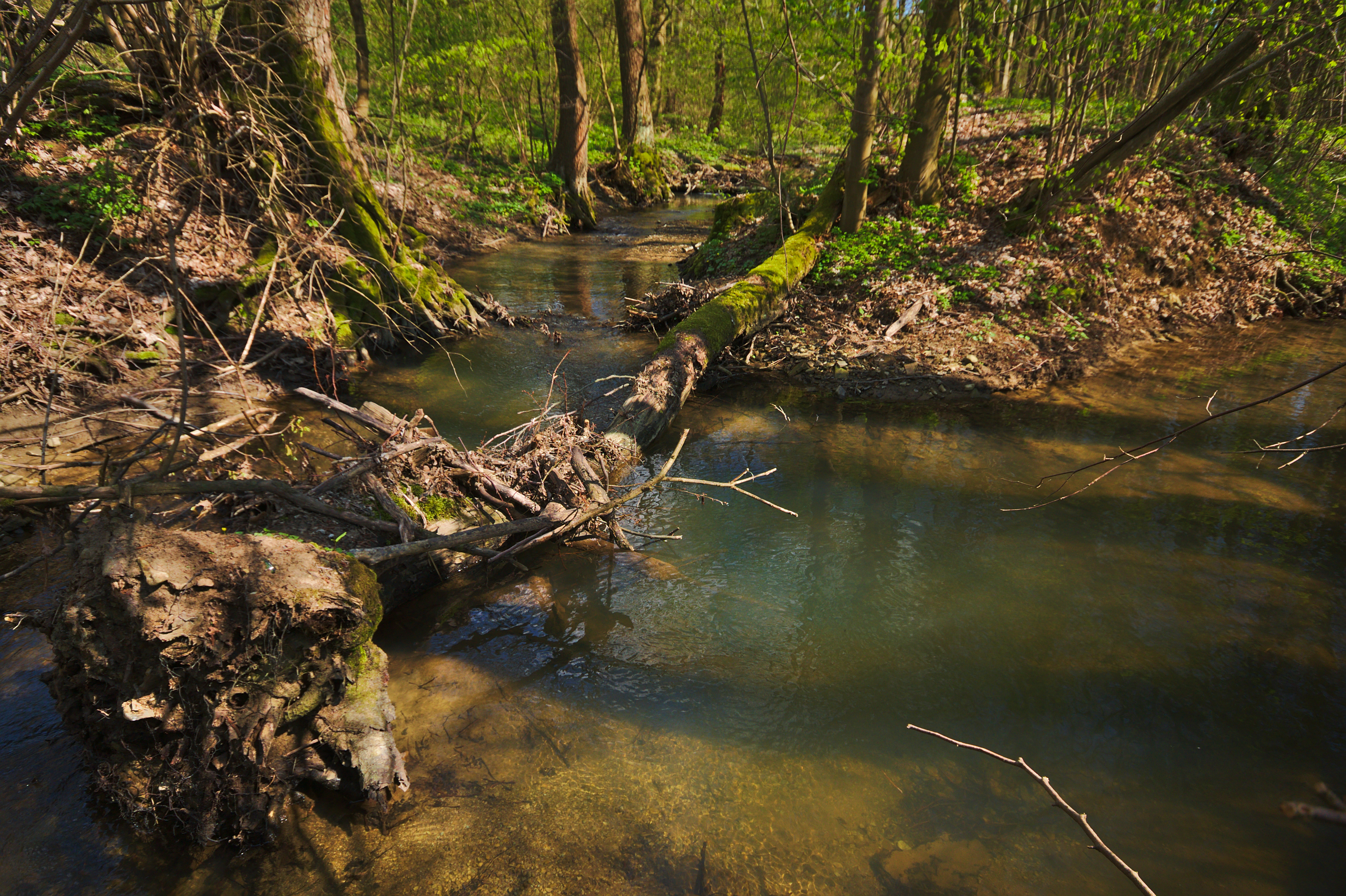 Přírodní památka Smolinka, okres Zlín